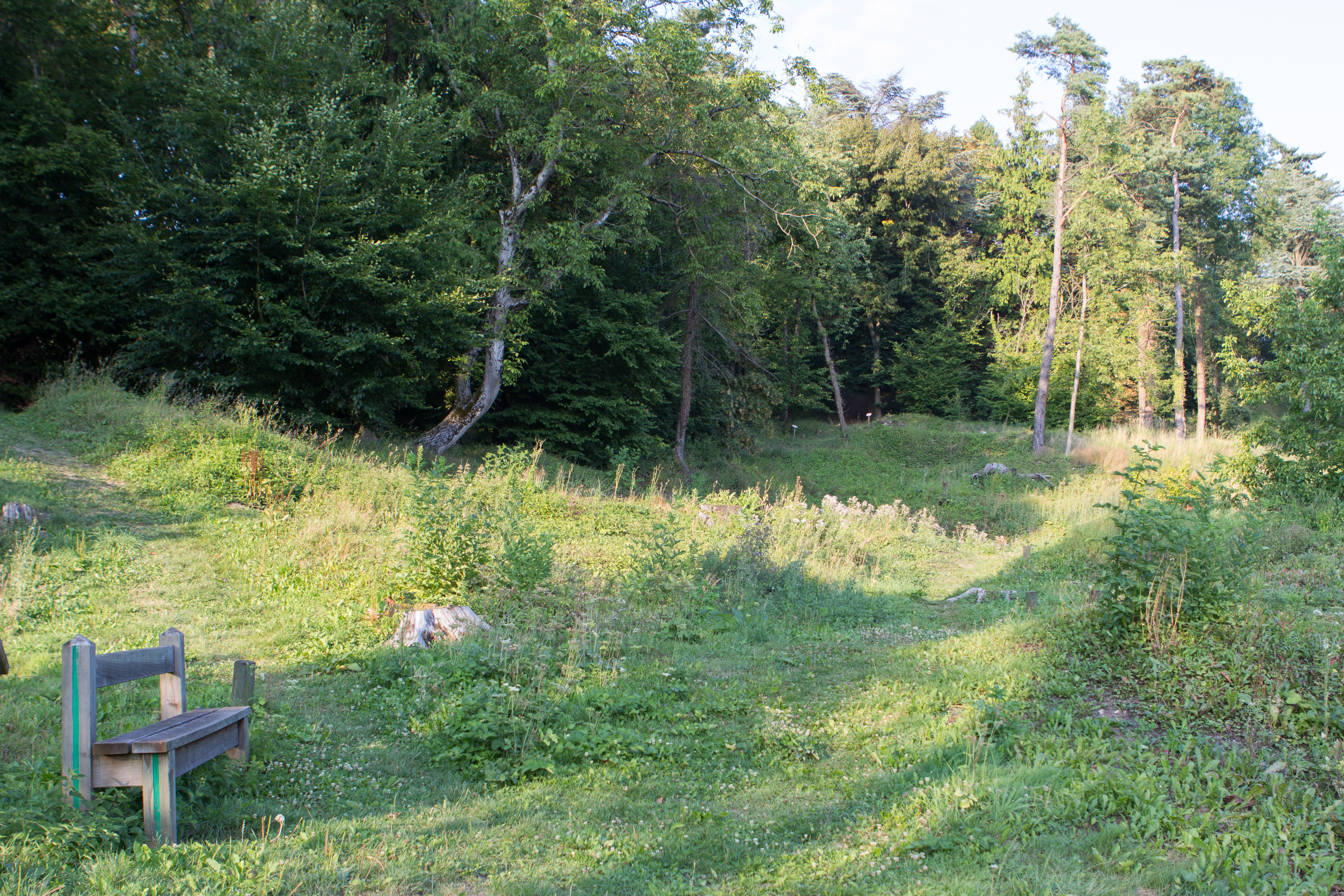 Vue de l'emplacement de l'ancien Craonne (Rue Saint-Rémy) / Craonne, Aisne, France